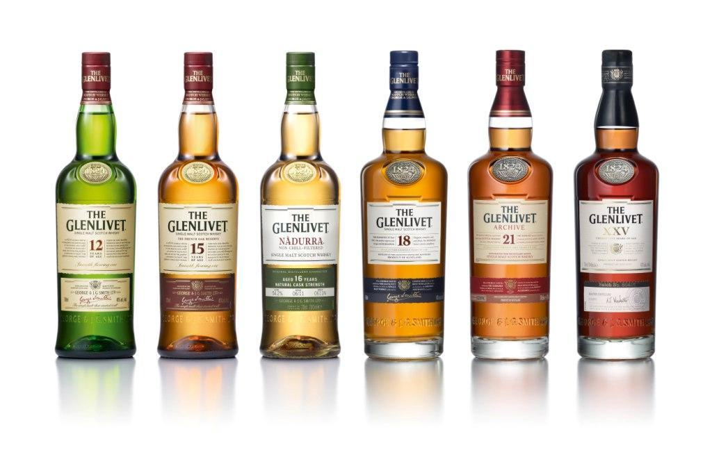 Whisky Glenlivet